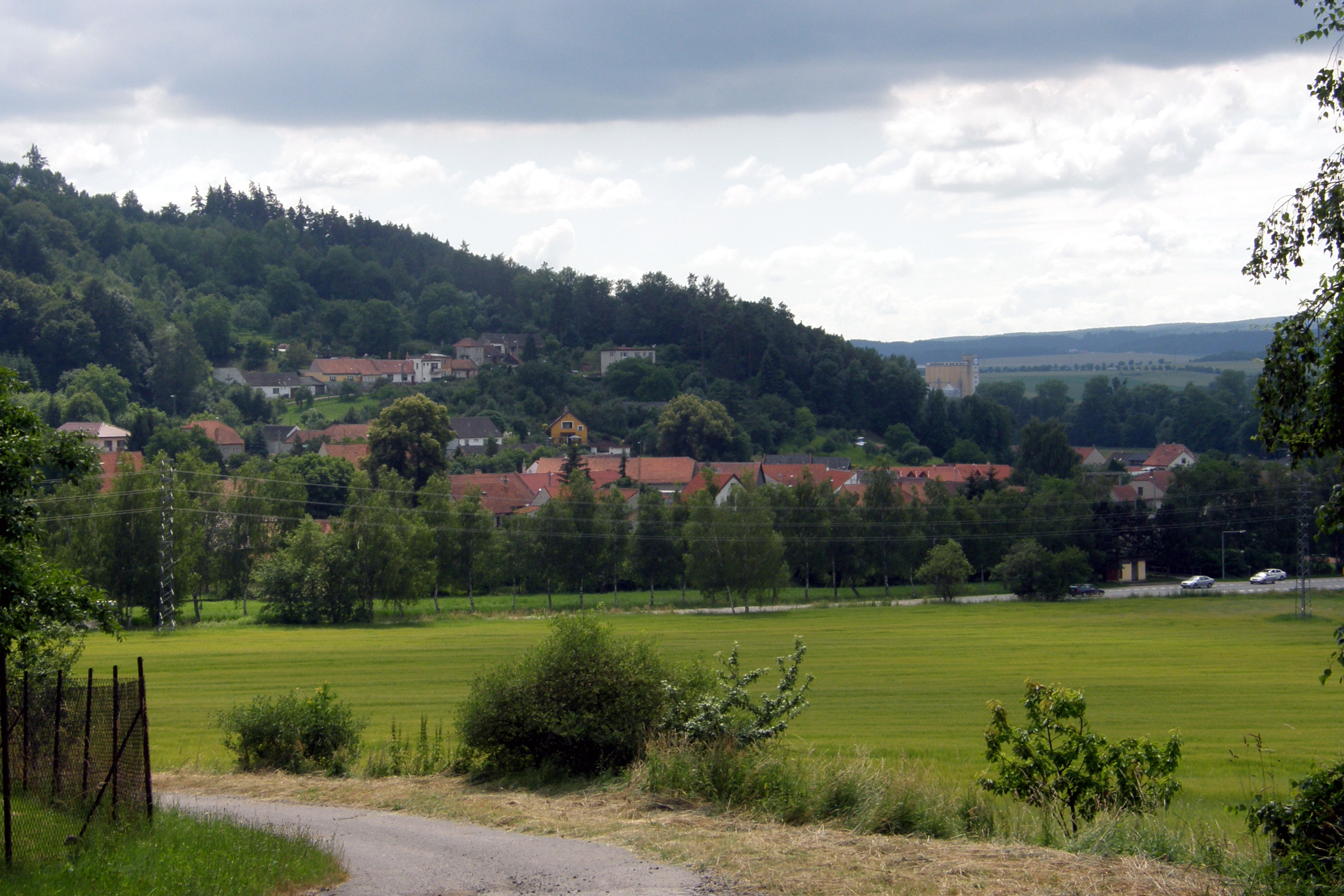 Mladkov, vesnice v okrese Blansko